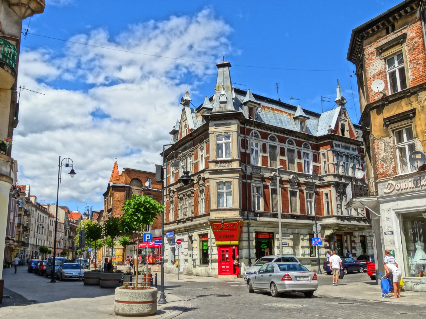 Ulica Dworcowa w Bydgoszczy w rejonie skrzyżowania z ul. Marcinkowskiego